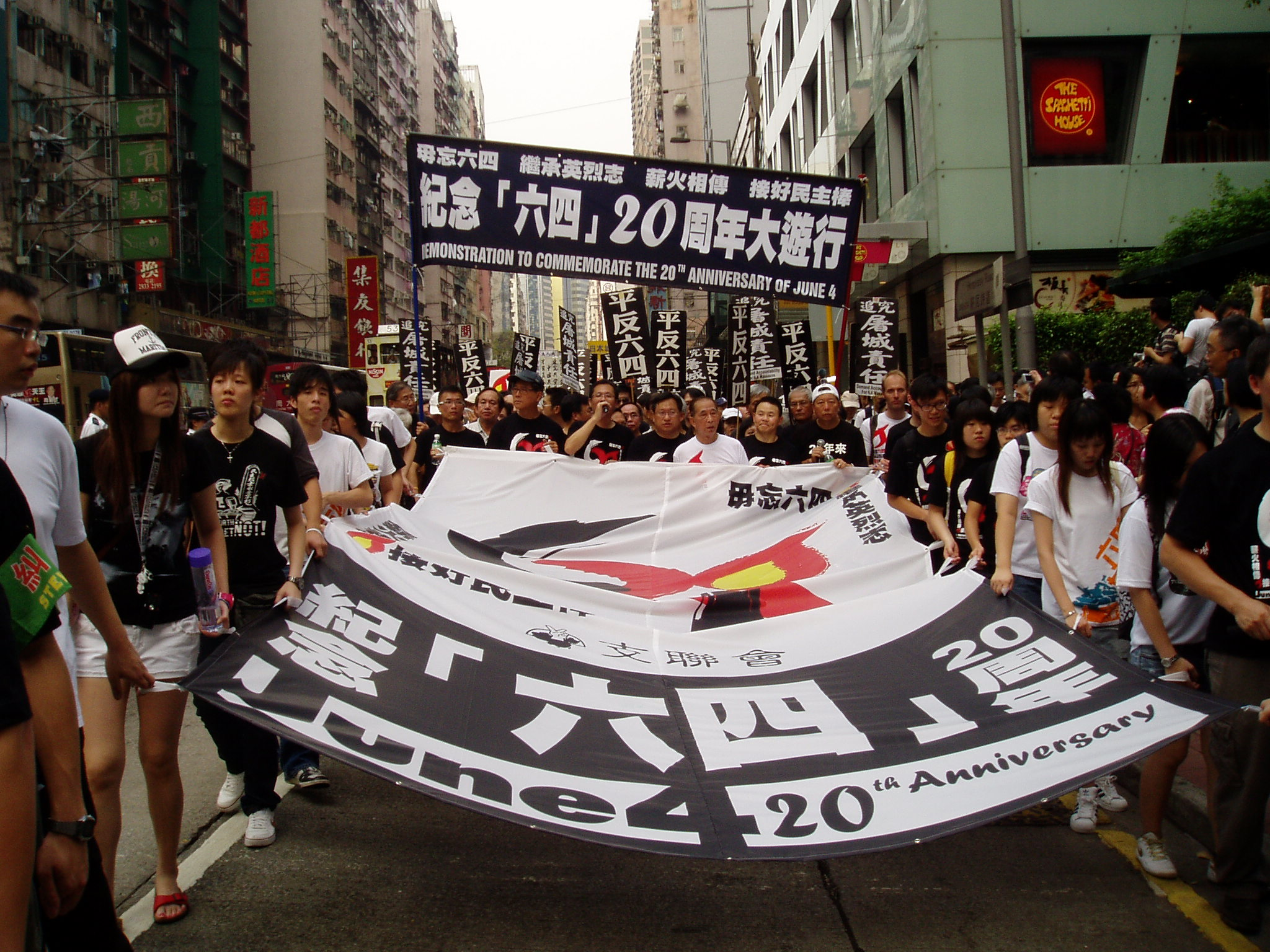 Março para 20º anniversaio de Massacre de 4 de Junho em Hong Kong